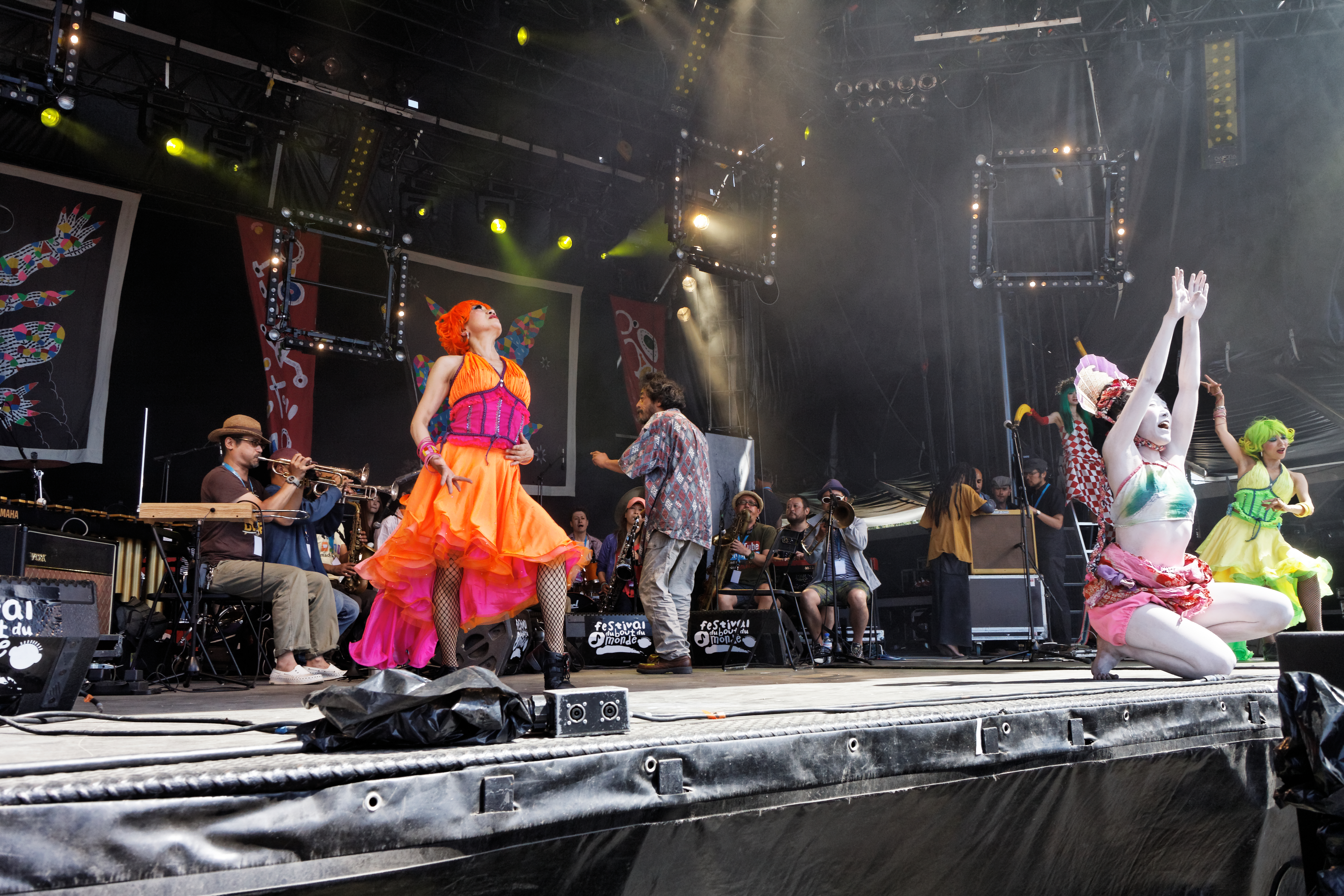 Le Shibusa Shirazu Orchestra en concert sur la scène Landaoudec lors du festival du bout du Monde à Crozon dans le Finistère (France).